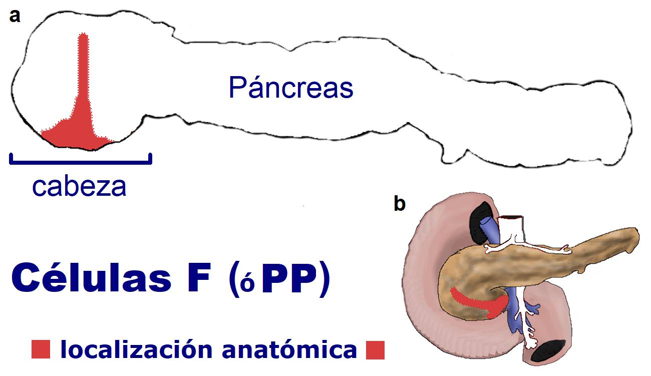 Figura 1 C. Análisis de la distribución de células PP, en páncreas humano entero. a_ Área restringida rica en células PP, en la cabeza del páncreas, ilustrada en rojo. b_ La misma región rica en células PP proyectada sobre el páncreas en posición anatómica (in vivo). La localización fue obtenida mediante el estudio microscópico de cortes sucesivos adyacentes de páncreas humano entero.